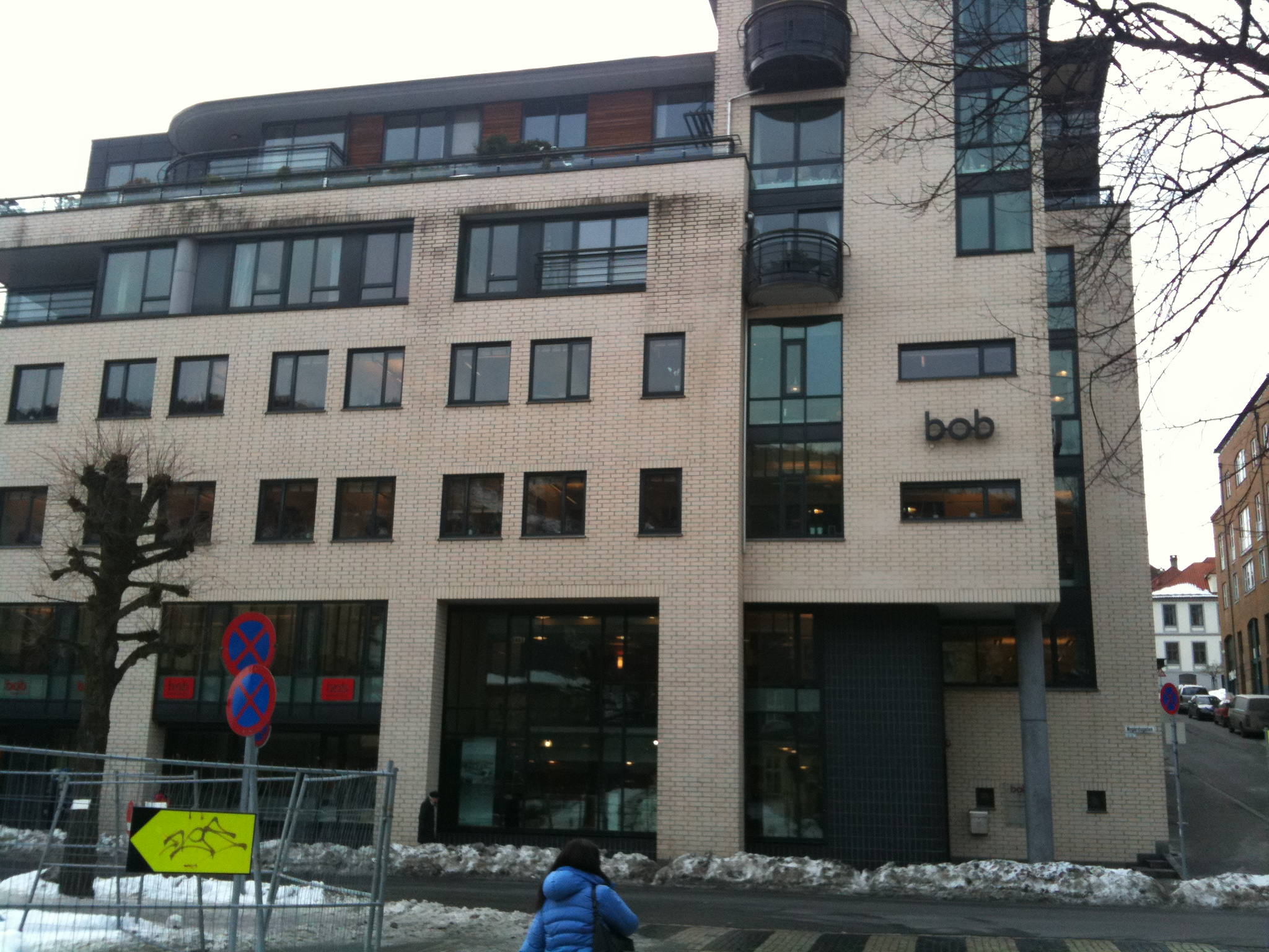 Bergen og Omegn Boligbyggelags hovedkontor i Bergen